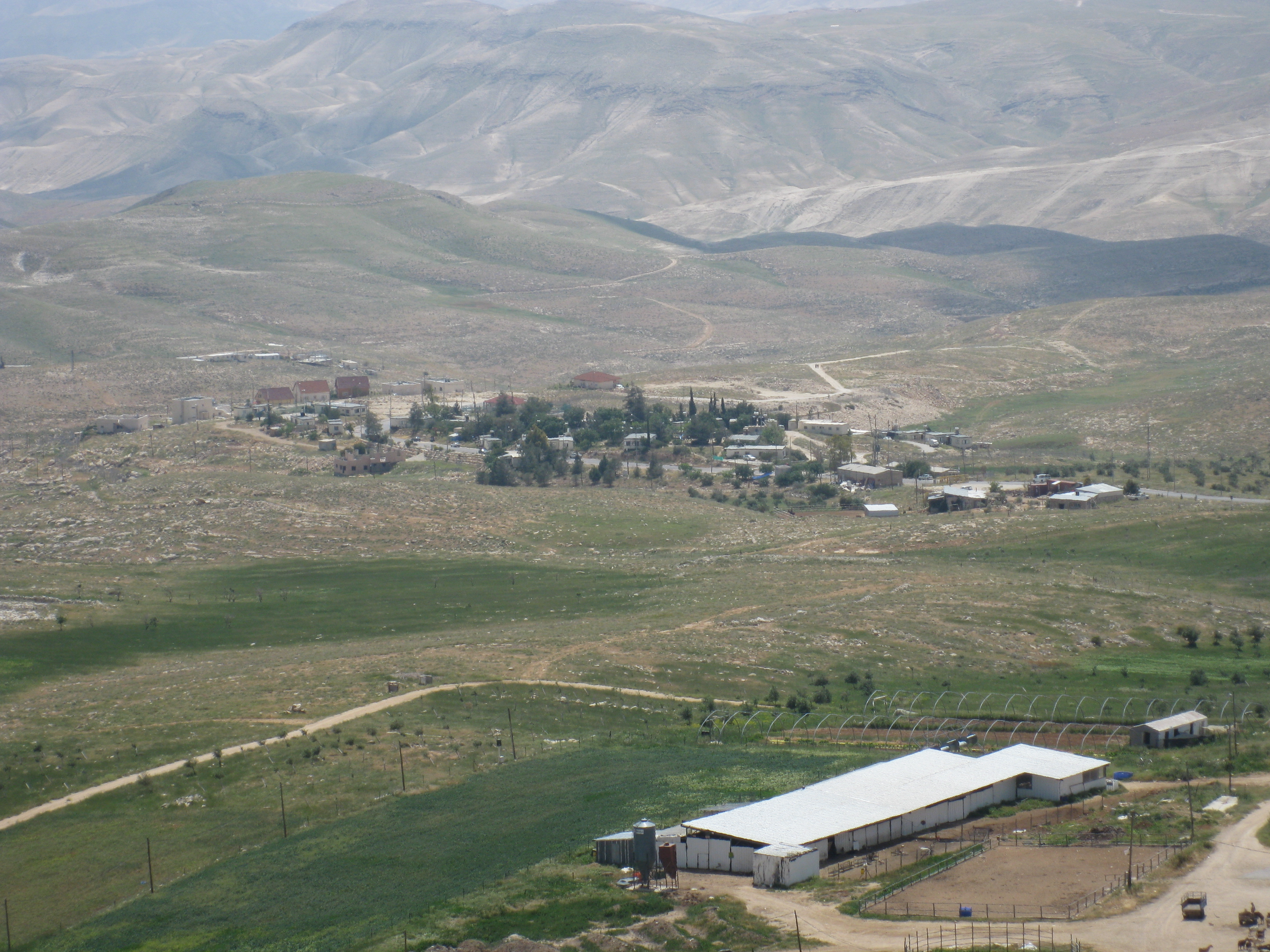 Views from Herodion (Herodyon, Herodium) - Ma'ale Rehav'am and Sdeh Bar (in the forground) מבט מהרודיון - בקדמת התמונה חוות שדה בר, במרכז התמונה, מעלה רחבעם